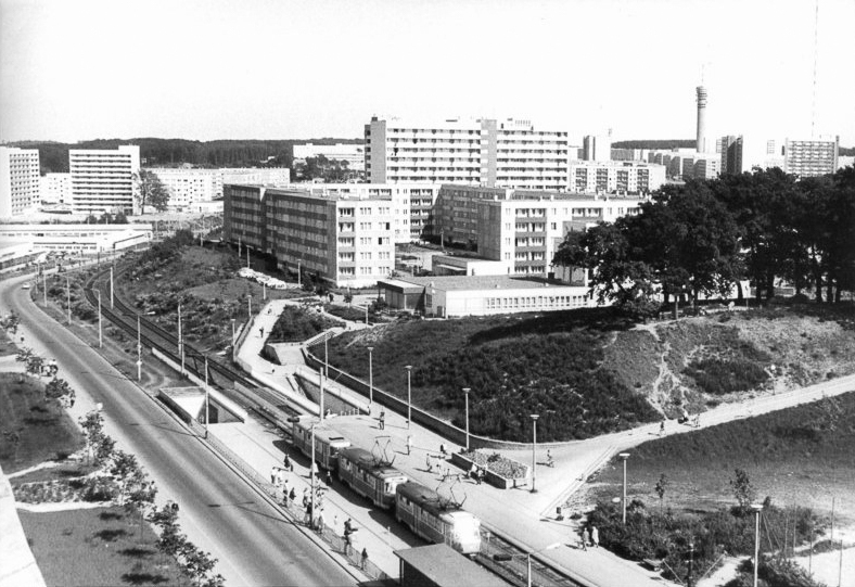 Schwerin, Großer Dreesch ADN-ZB Pätzold-11.11.1986 Schwerin: 10 Jahre Industrie-Agrar Bezirk-Gleichzeitig mit dem Bau des großen Industriekomplexes Schwerin-Süd entstand mit dem Großen Dreesch (Foto) ein modernes Wohngebiet, in dem gegenwärtig 60000 Schweriner wohnen. Kindereinrichtungen, Schulen, Kaufhallen, Gaststätte, Dienstleitungseinrchtungen sowie Sport- und Schwimmhallen und nicht zuletzt die landschaftlich reizvolle Lage am Ufer des Schweriner Sees zeichnen dieses attraktive Wohngebiet aus. Eine Straßenbahnstrasse verbindet den Großen Dreesch mit dem Industriegebiet Schwerin-Süd. -siehe auch 25 und 26N sowie dazu die Bezirkskorrespondenz